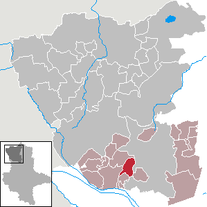 (Original text: Solpke im Landkreis Salzwedel)